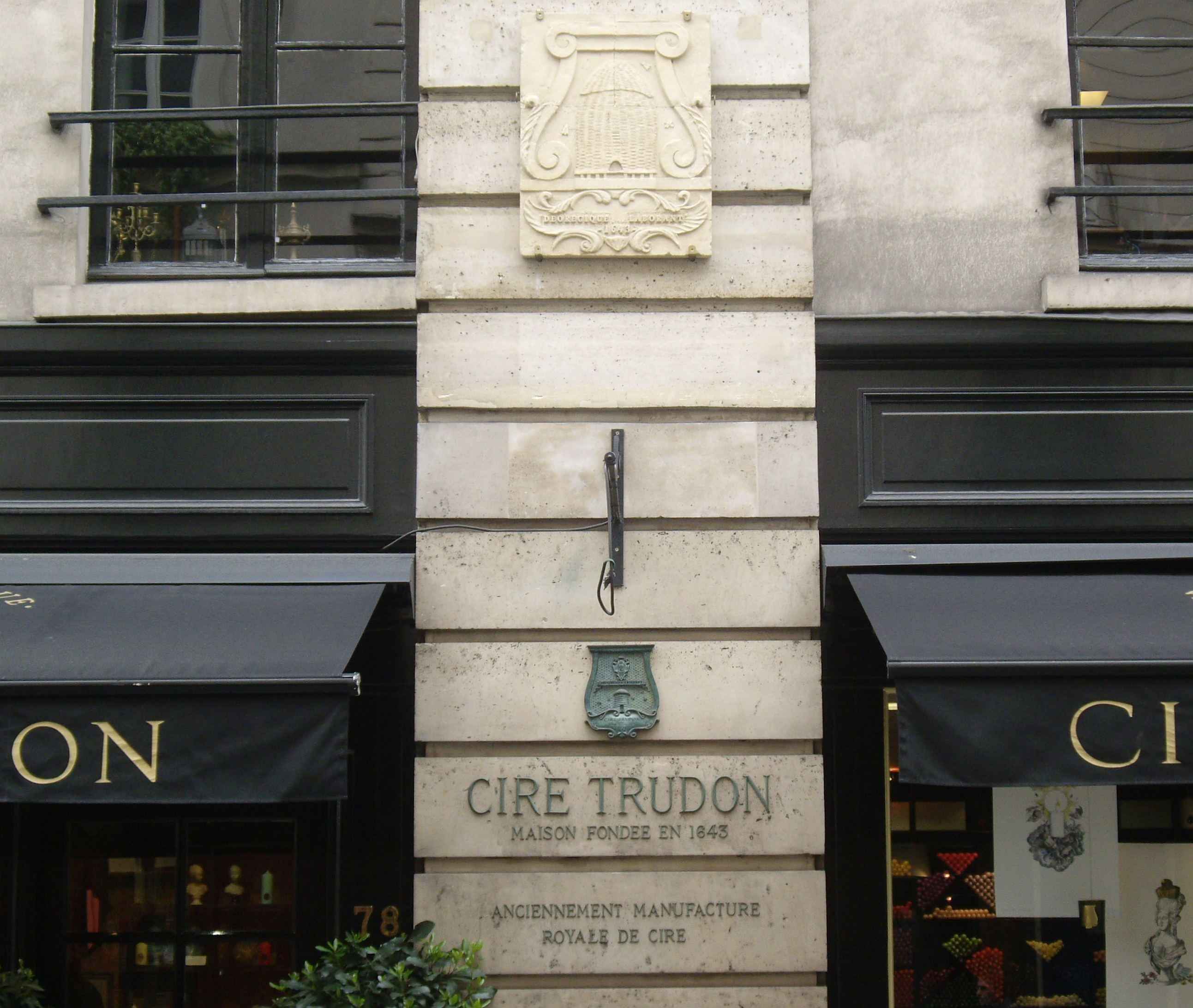 Plaques de l'ancienne Manufacture royale de cire, fondée en 1643, sur la façade de la maison Cire Trudon, au n° 78 de la rue de Seine, Paris 6e. La plaque supérieure, où figurent une ruche et des abeilles, porte la devise Deoregique laborant : Elles [les abeilles] travaillent pour Dieu et le Roi.